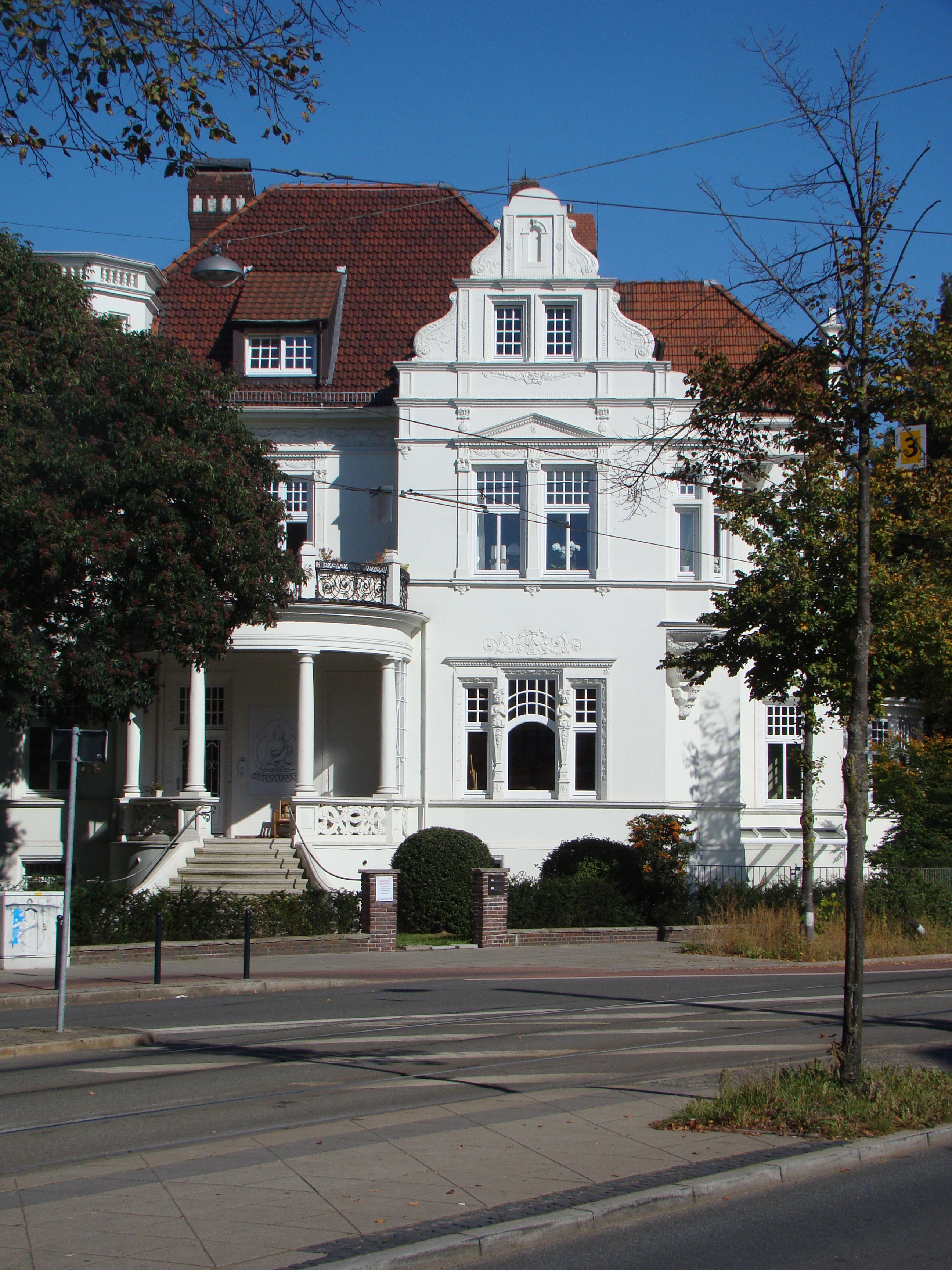 Villa Korff in Bremen, Parkallee 79.Das abgebildete Objekt ist ein geschütztes Kulturdenkmal in der Freien Hansestadt Bremen, mit der Nr. 0999 beim Landesamt für Denkmalpflege registriert.